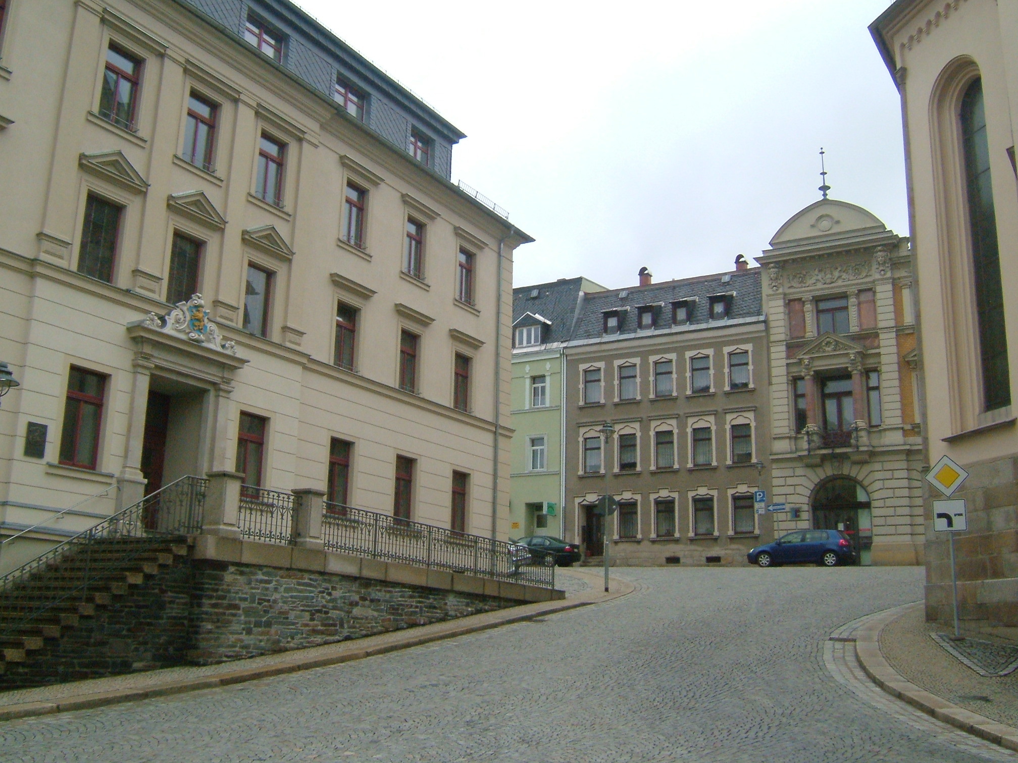 Markneukirchen, in April 2008. The Rathaus.